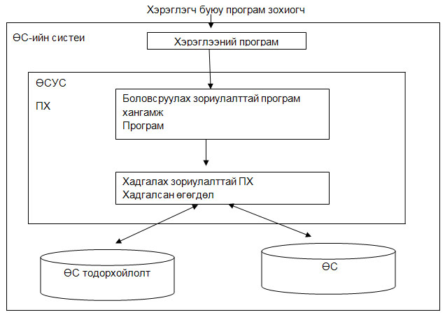 Монгол: өгөгдлийн сан1